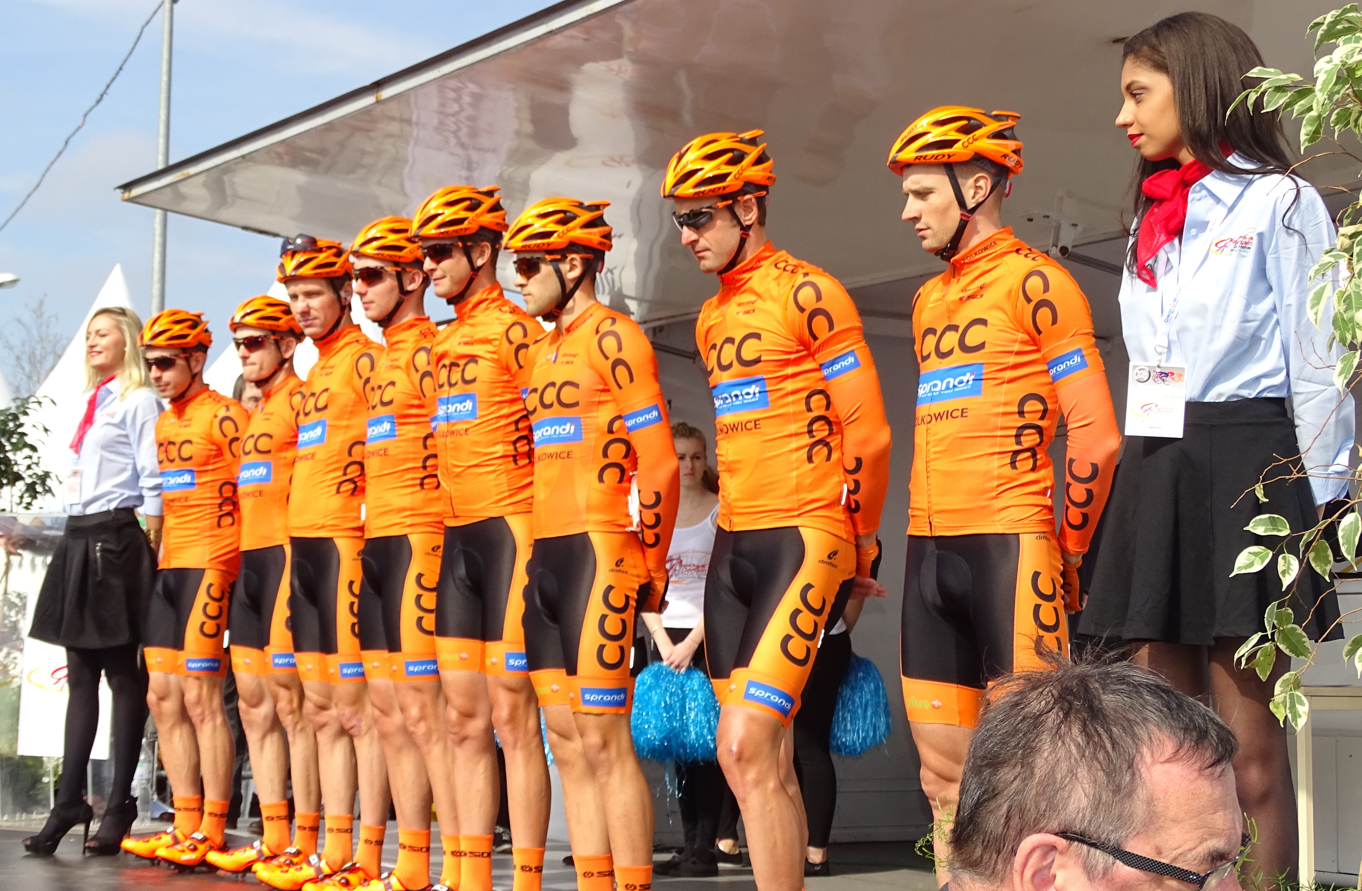 Reportage réalisé le jeudi 14 avril à l'occasion du départ et de l'arrivée du Grand Prix de Denain 2016 à Denain, Nord, Nord-Pas-de-Calais-Picardie, France.